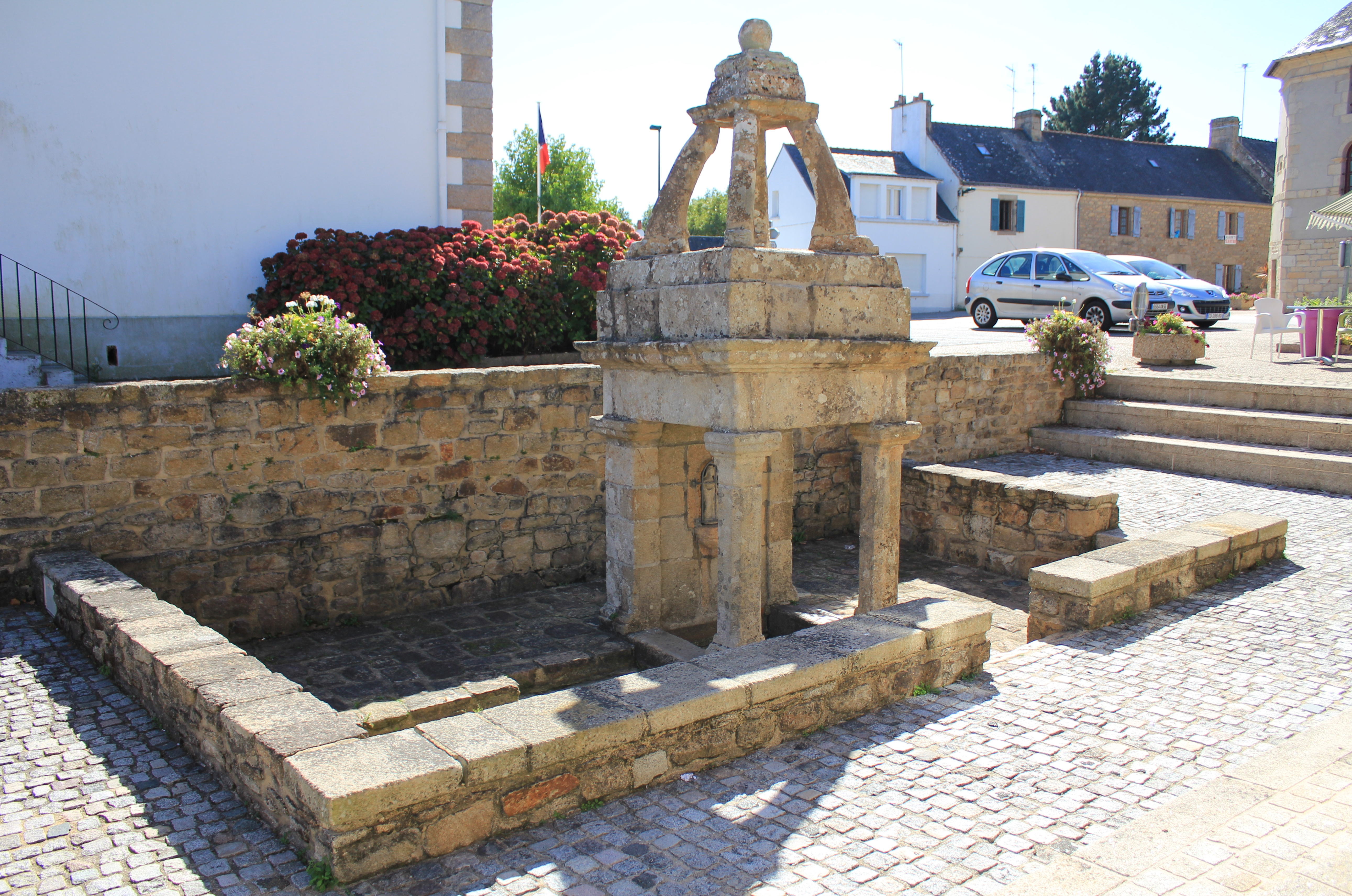 Fontaine du bourg (Sainte-Hélène, Morbihan) .